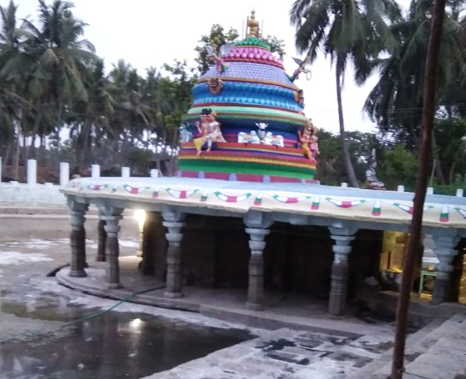 నత్తా రామేశ్వరం